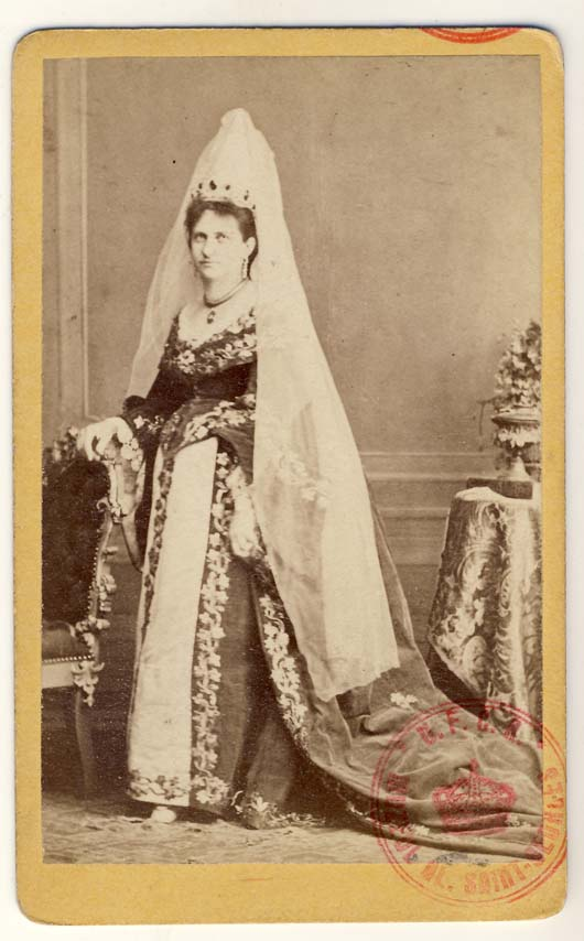 Matei Millo în costum de teatru, costum feminin, piesa Banul Mărăcine